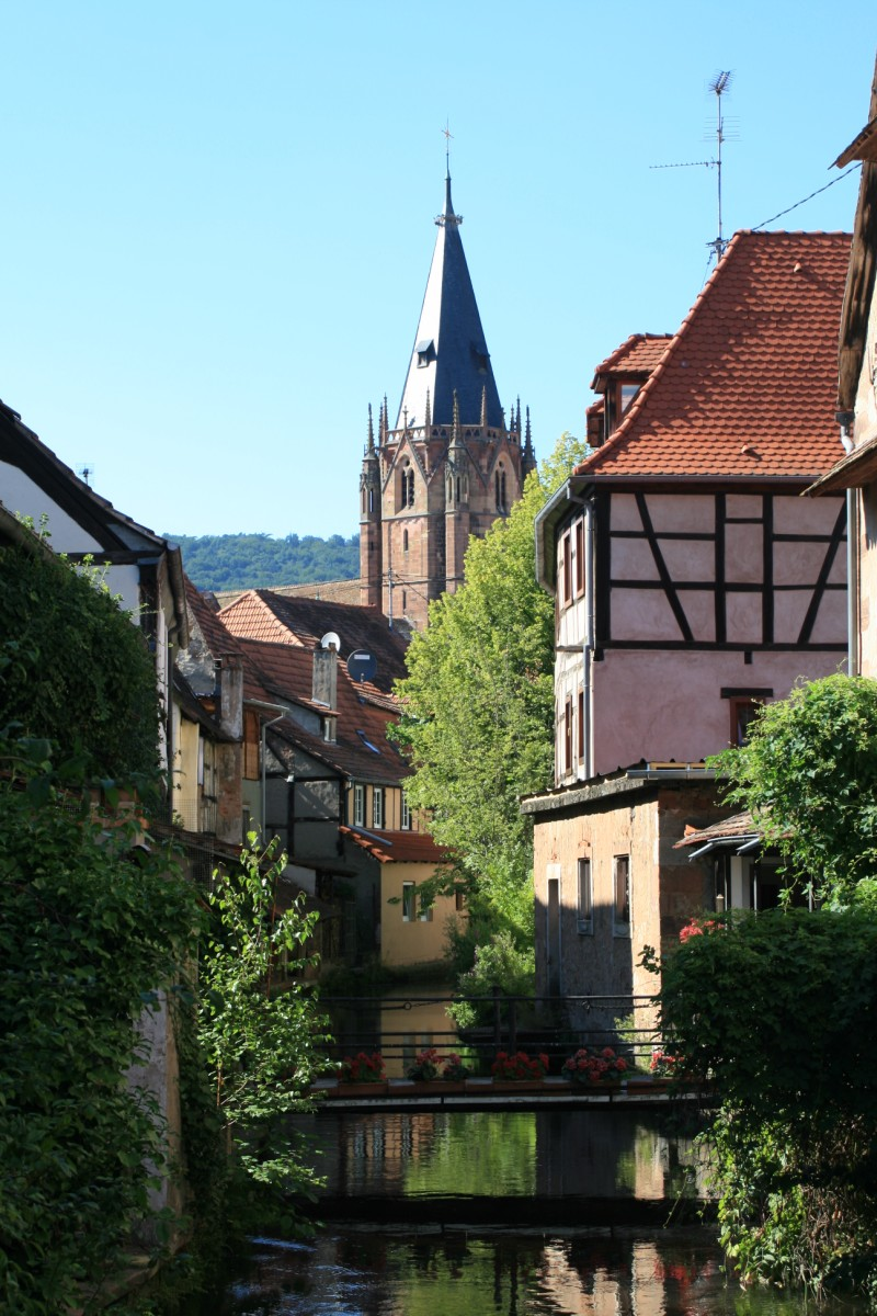 Wissembourg